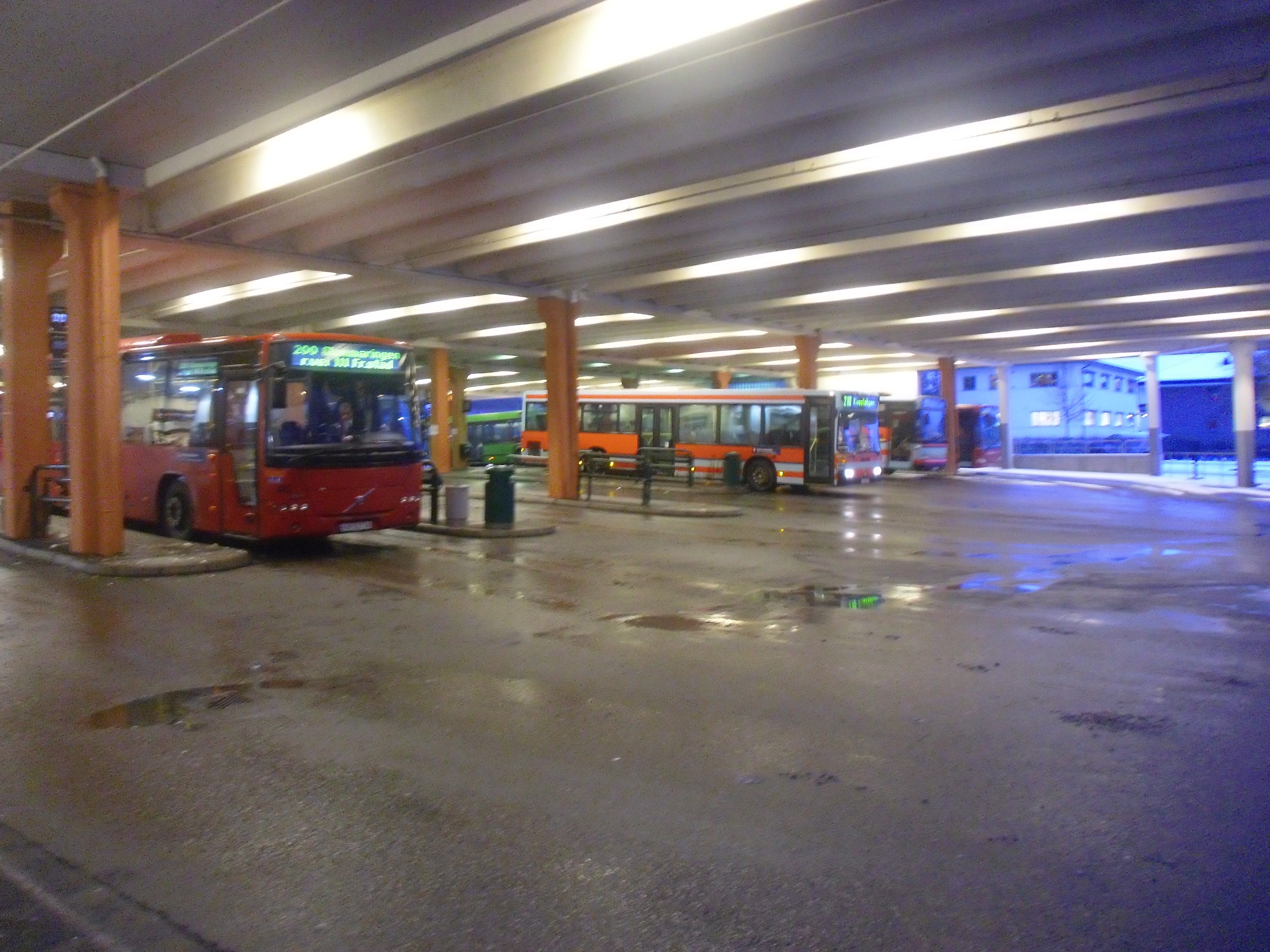 Sarpsborg bussterminal.